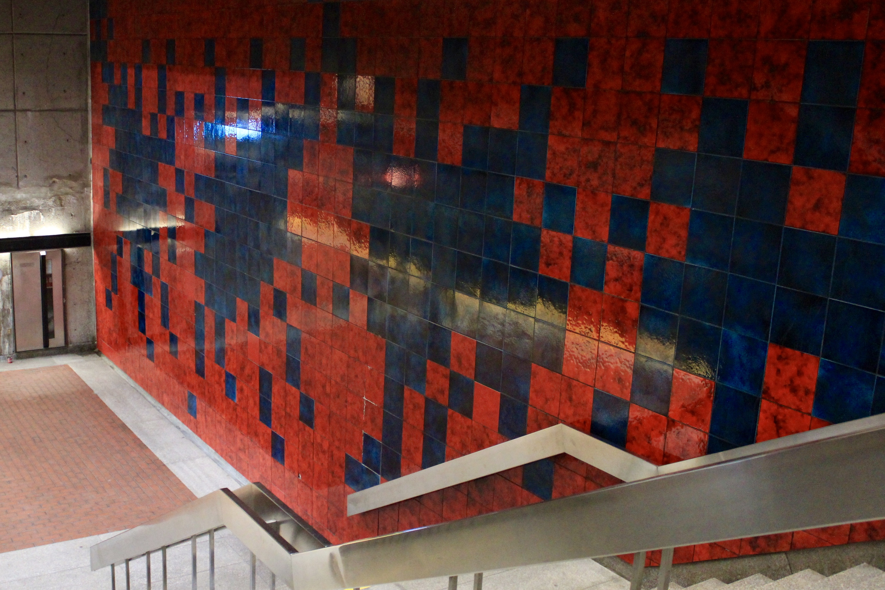 Murale de la station Honore-Beaugrand, quai direction Angrignon.